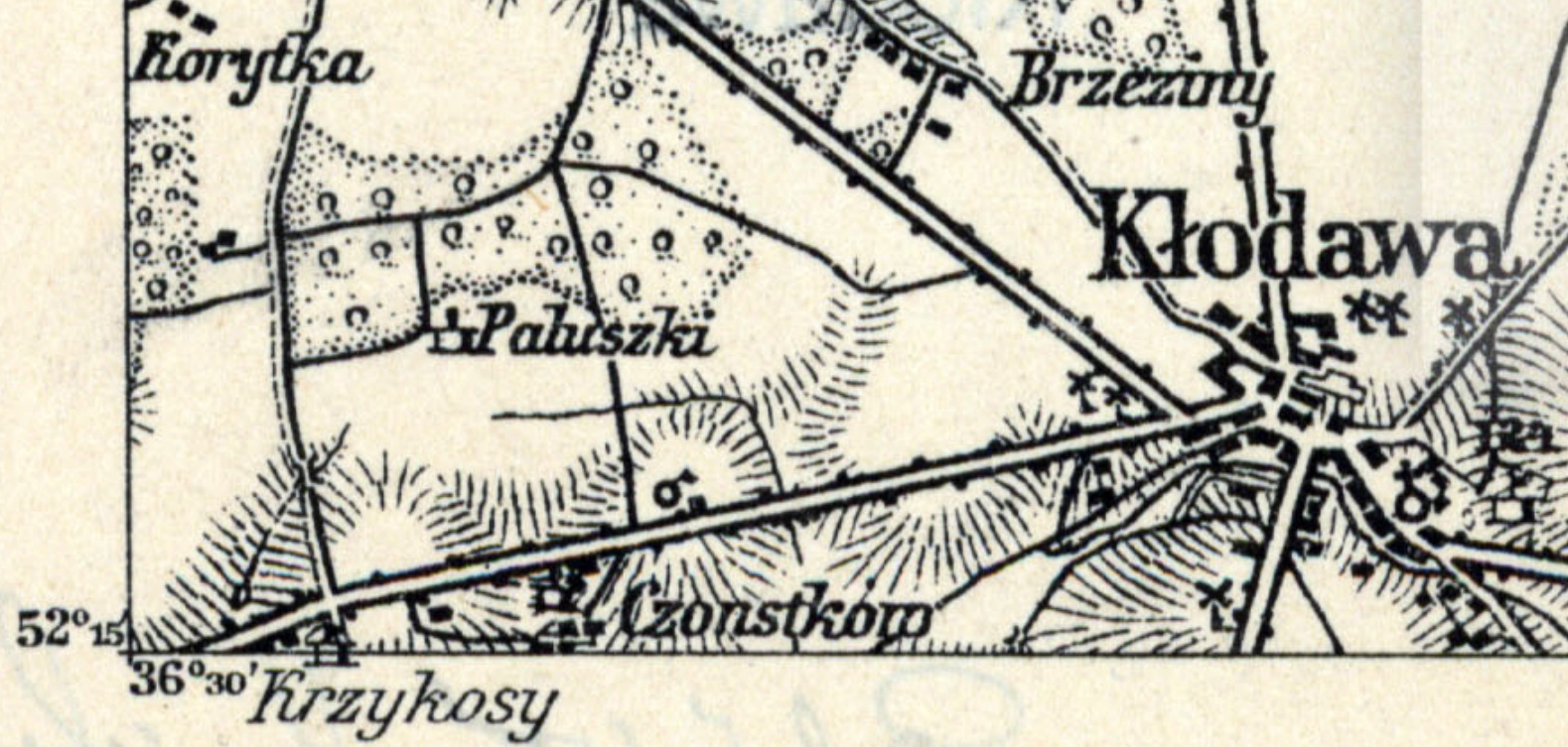 Cząstków na mapie z1914r